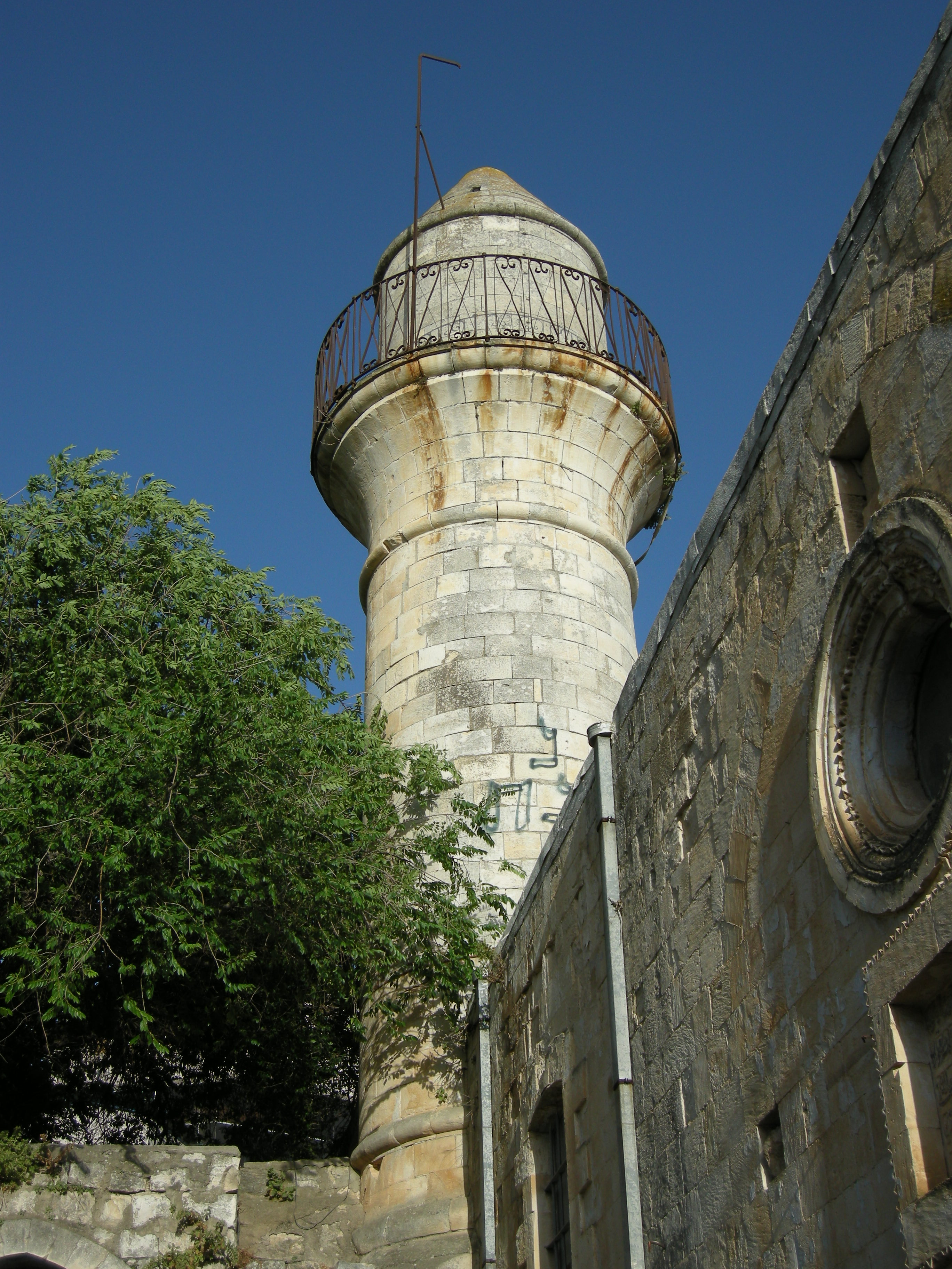 Safed